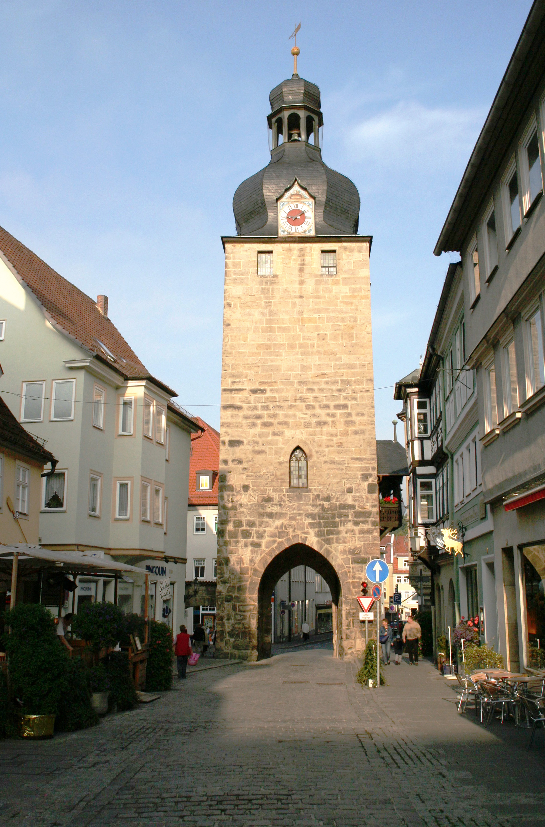 Judentor, Coburg (Germany)